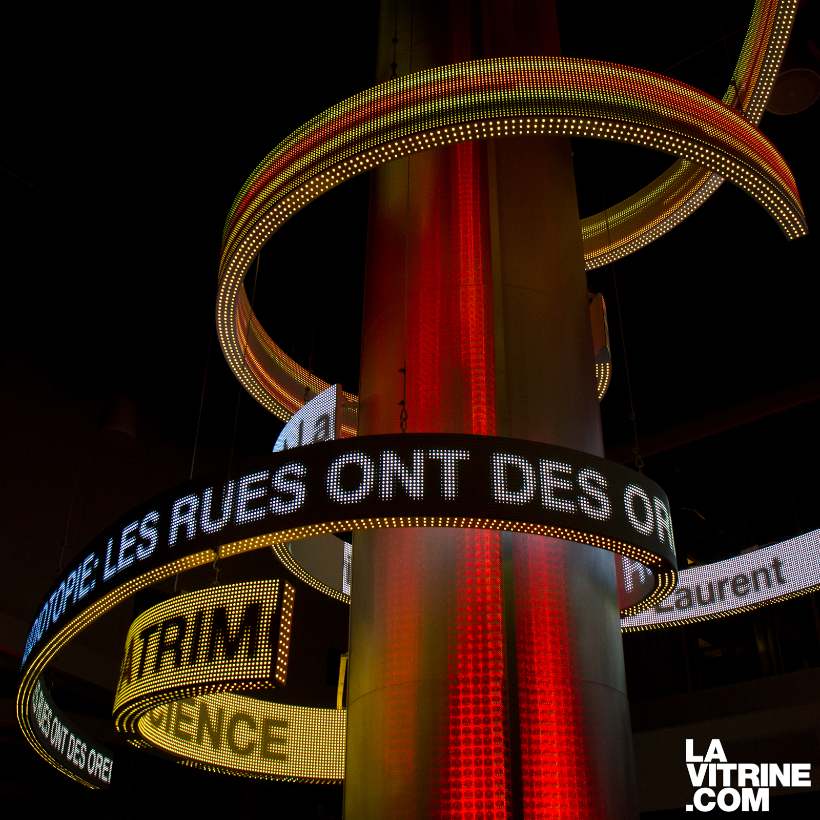 La Vitrine culturelle de Montréal, est située au 2, rue Sainte-Catherine Est. Information culturelle. Billets au tarif régulier et de dernière minute